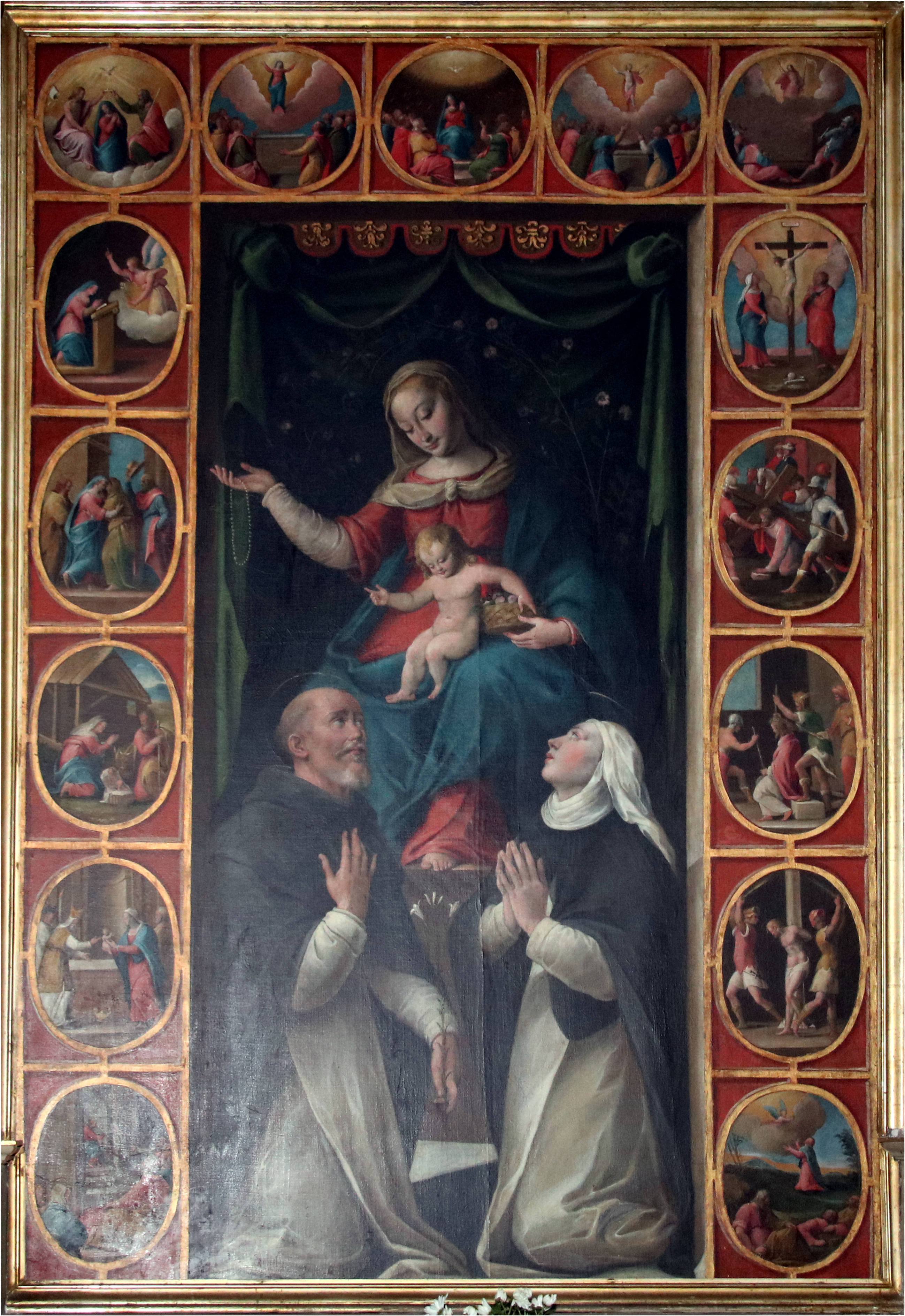 Francesco Longhi, Madonna del Rosario tra santi, 1610, chiesa di Santa Reparata (Terra del Sole)